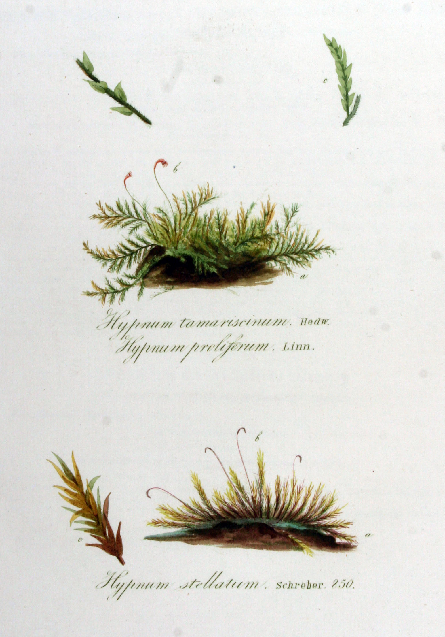 Hylocomium splendens (Hedw.) Schimp., syn. Hypnum proliferum Brid. Leskea tamariscina (Hedw.) Mitt., syn. Hypnum tamariscinum Hedw. Campylium stellatum (Hedw.) C.E.O. Jensen, syn. Hypnum stellatum Hedw.